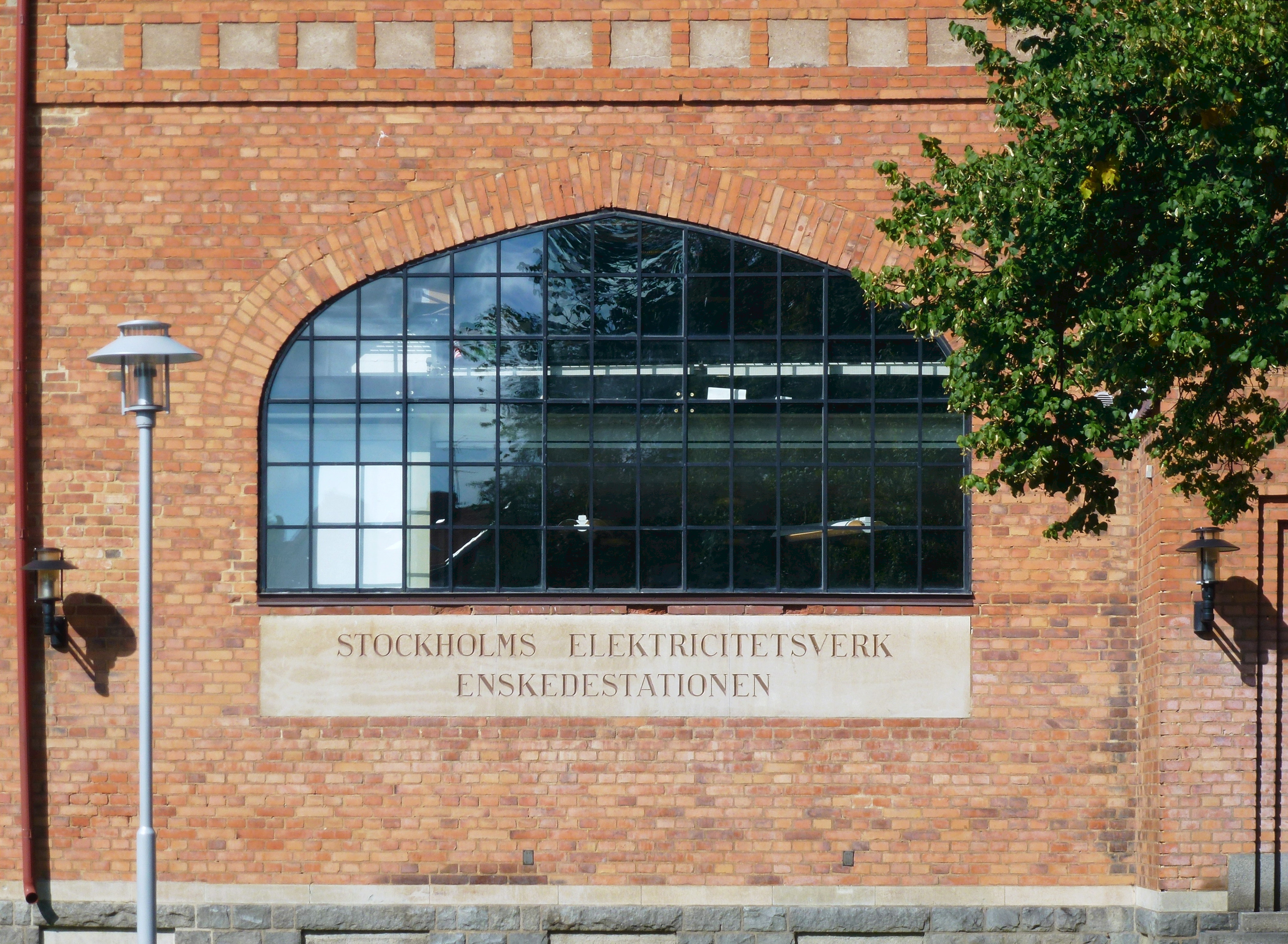 Enskedestationen